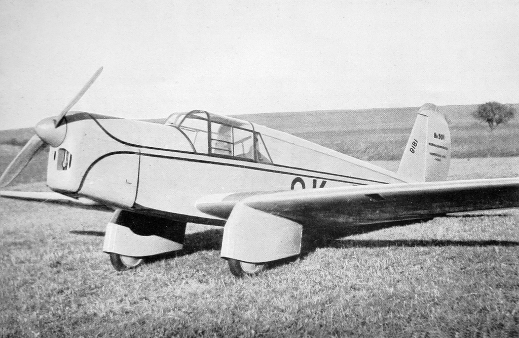 Walter Mikron a Beneš-Mráz Be-501 Bibi (1936)